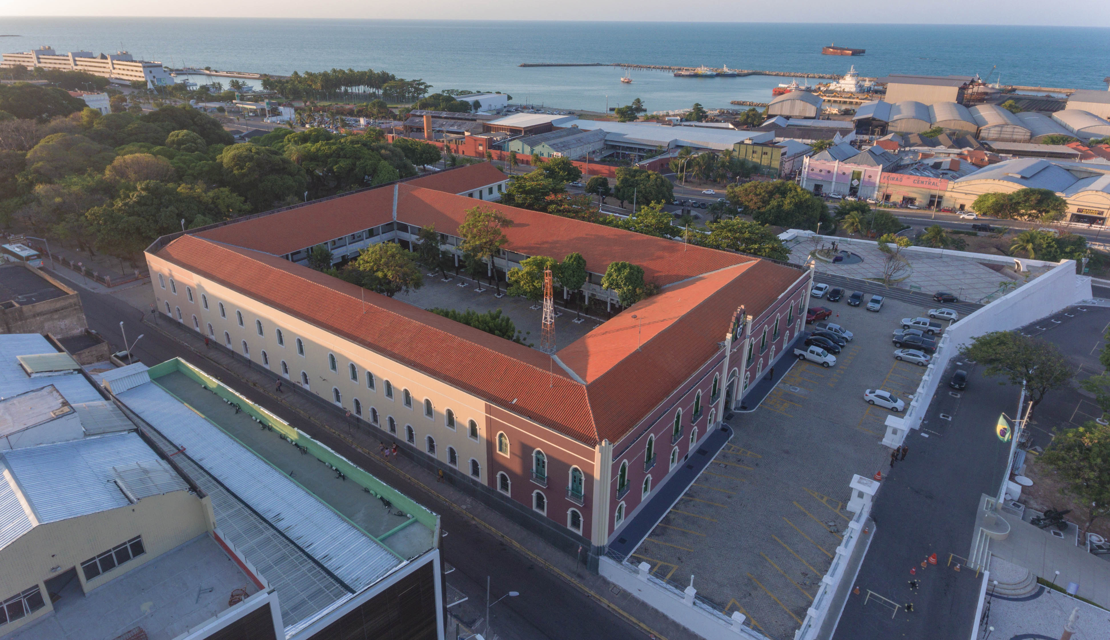 Visão aérea do Atual Quartel da 10ª Região Militar, no centro da cidade de Fortaleza.